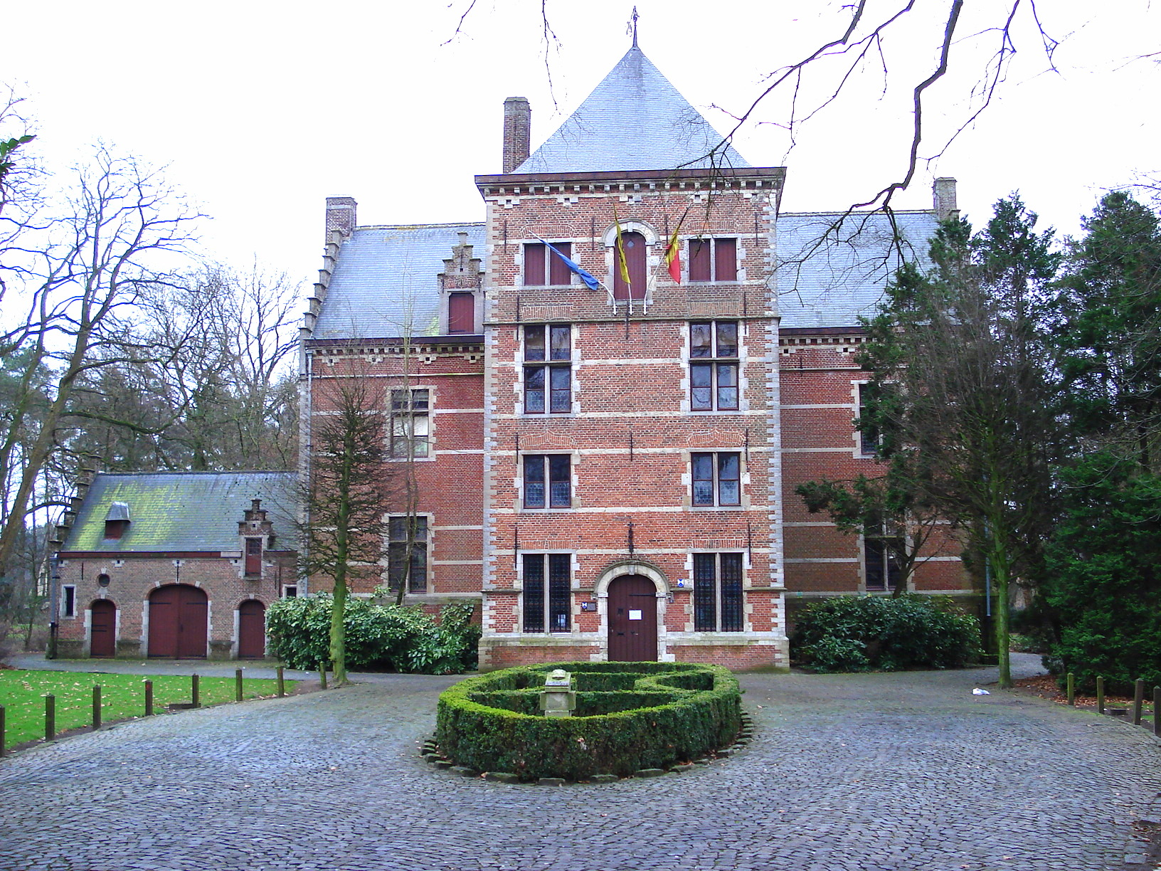 Wechelderzande, gem. Lille, prov. Antwerpen, België: Hof d'Intere (17de e.).